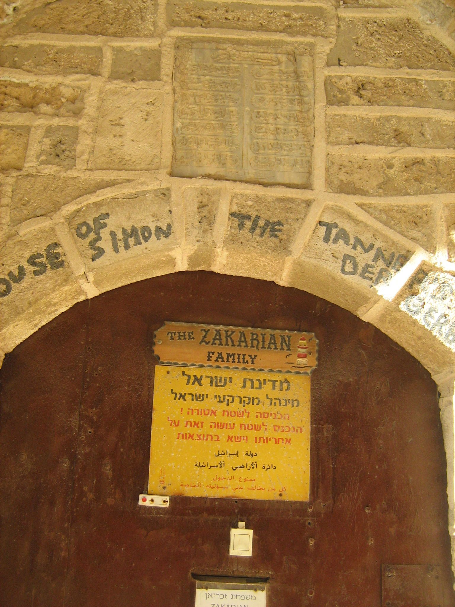 בית שמעון הבורסקאי ביפו